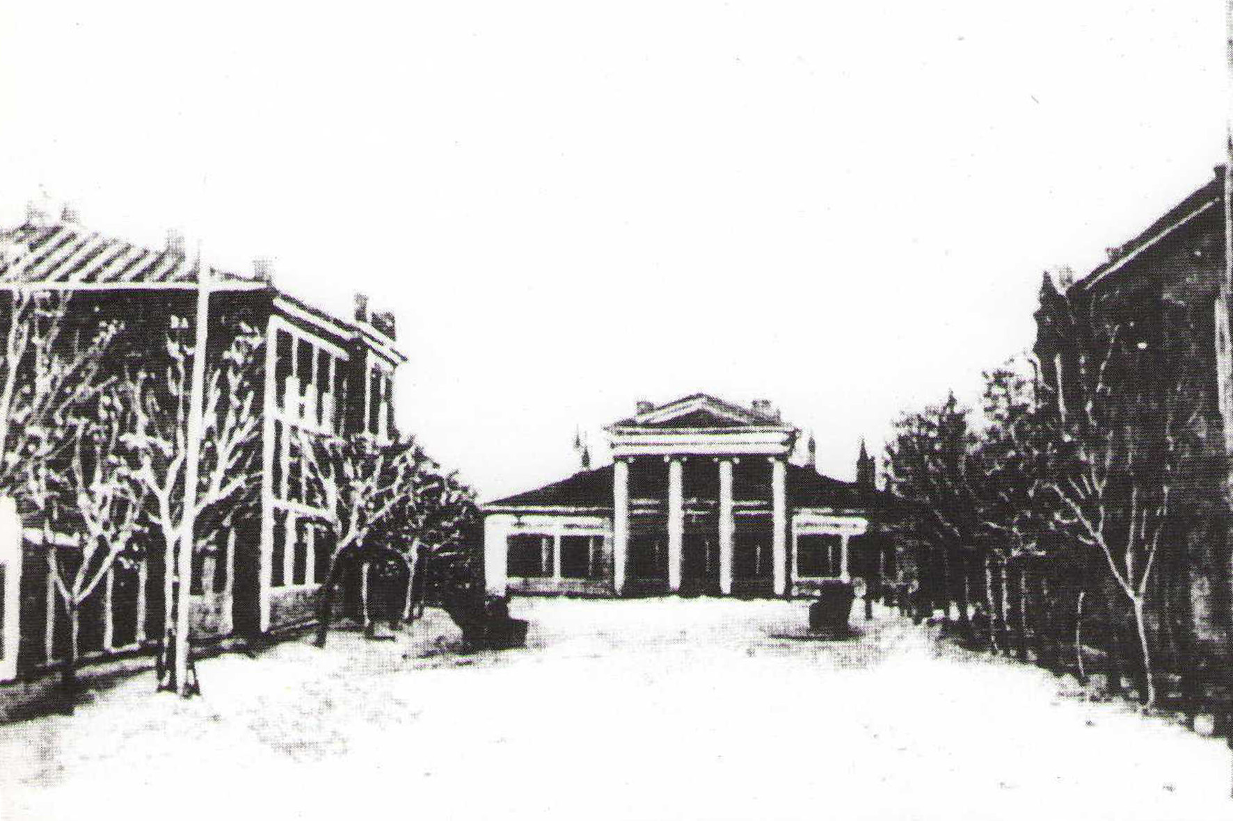 Водолікарня у Луганську. Колишня вул.Англійська